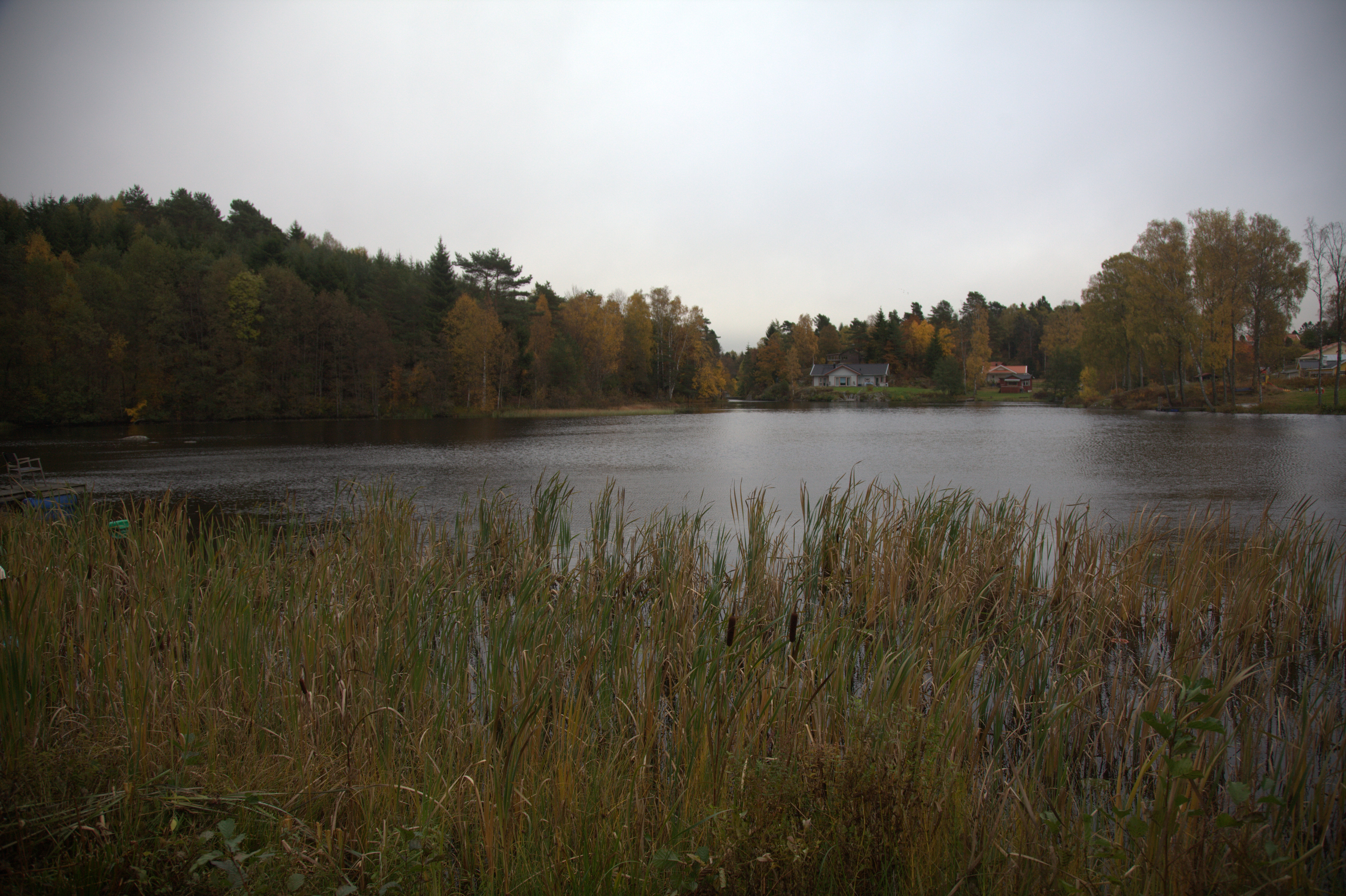 Duvesjön i Kungälv